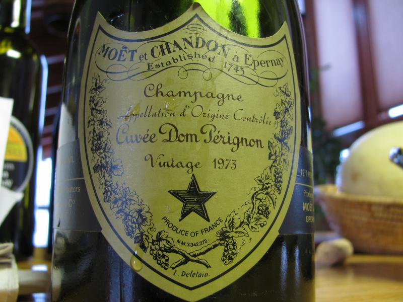 Cuvée Dom Pérignon, Négociant Manipulant 3342272